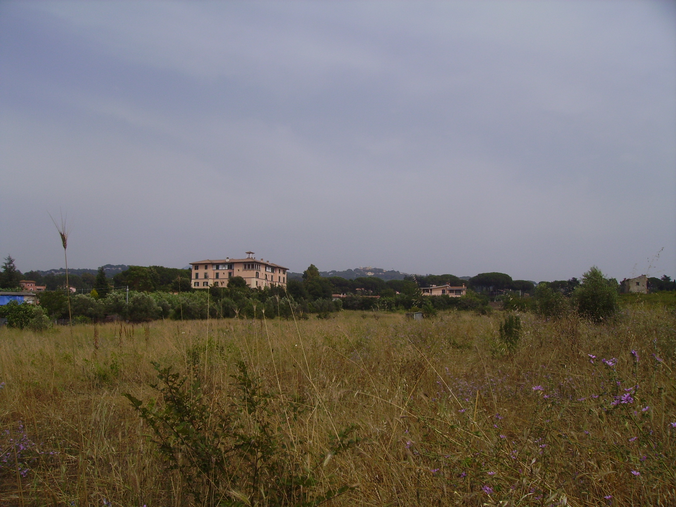 Campagna marinese in località Due Santi, nell'area dell'antica Bovillae